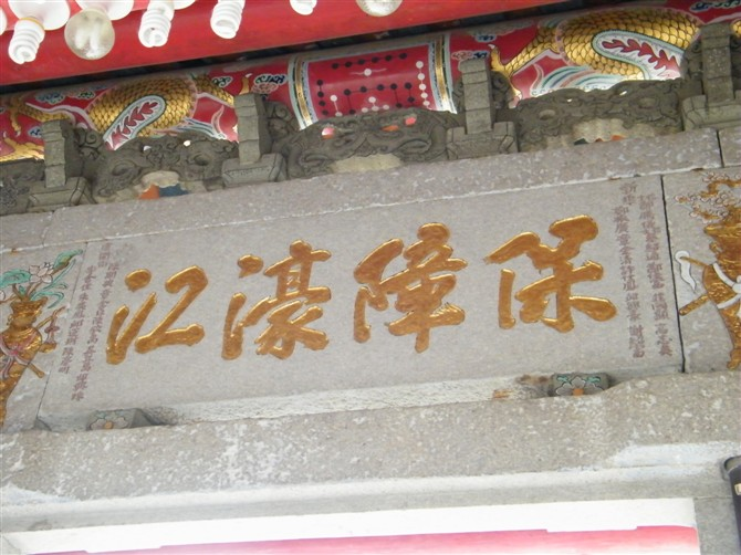 达濠巡司埠双忠古庙 “保障濠江”石匾